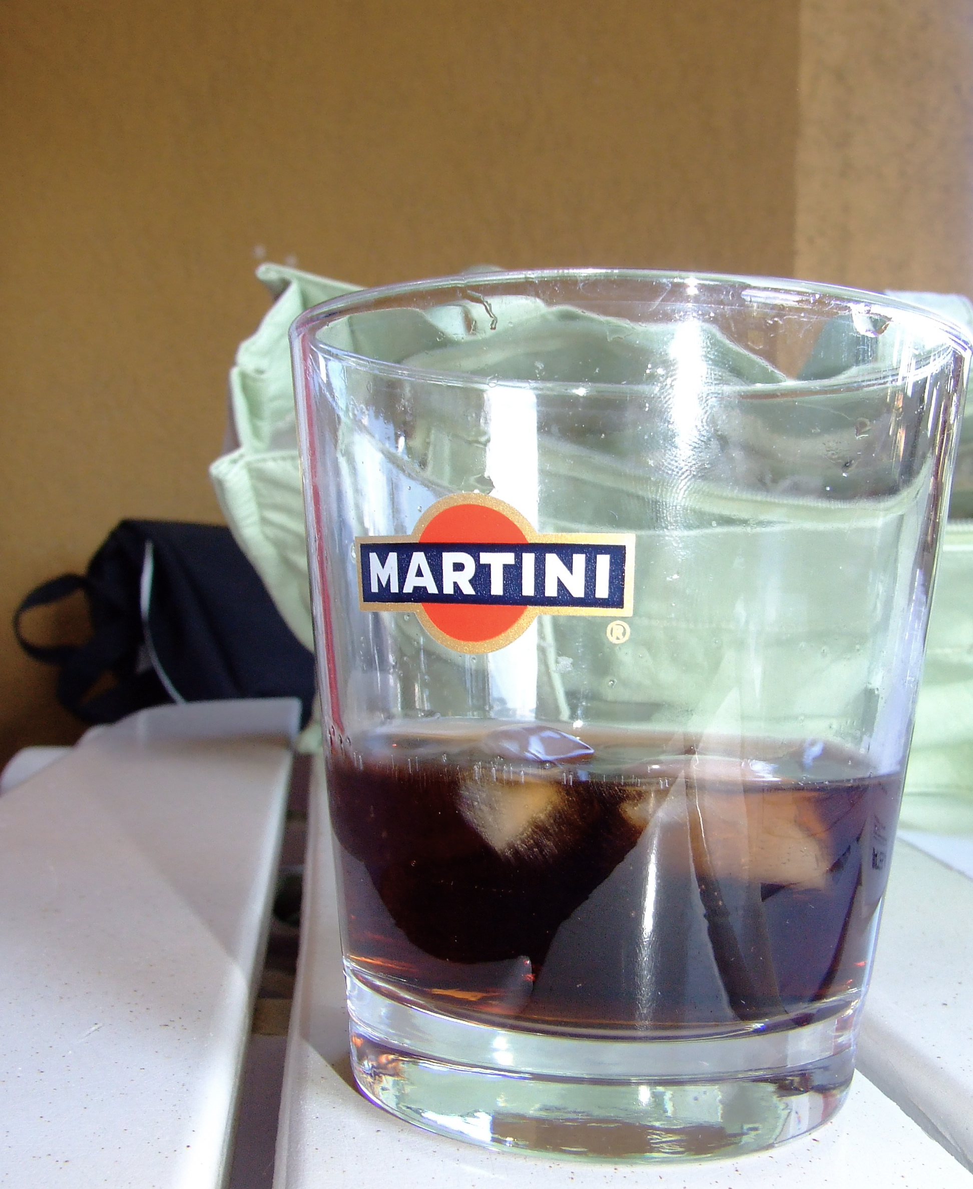 A Martini glass